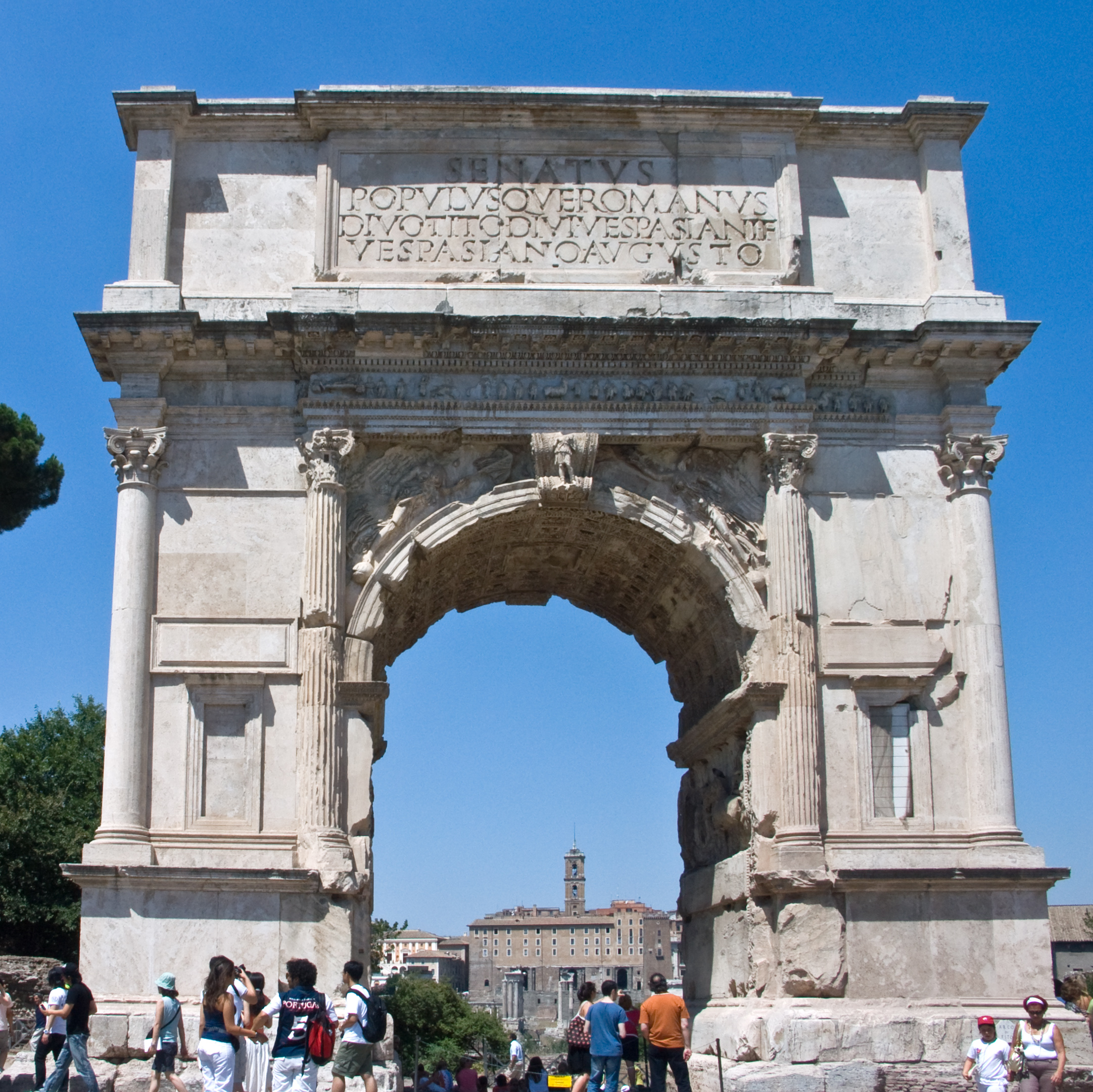 Arc de Titus. Forum Romain. Rome.